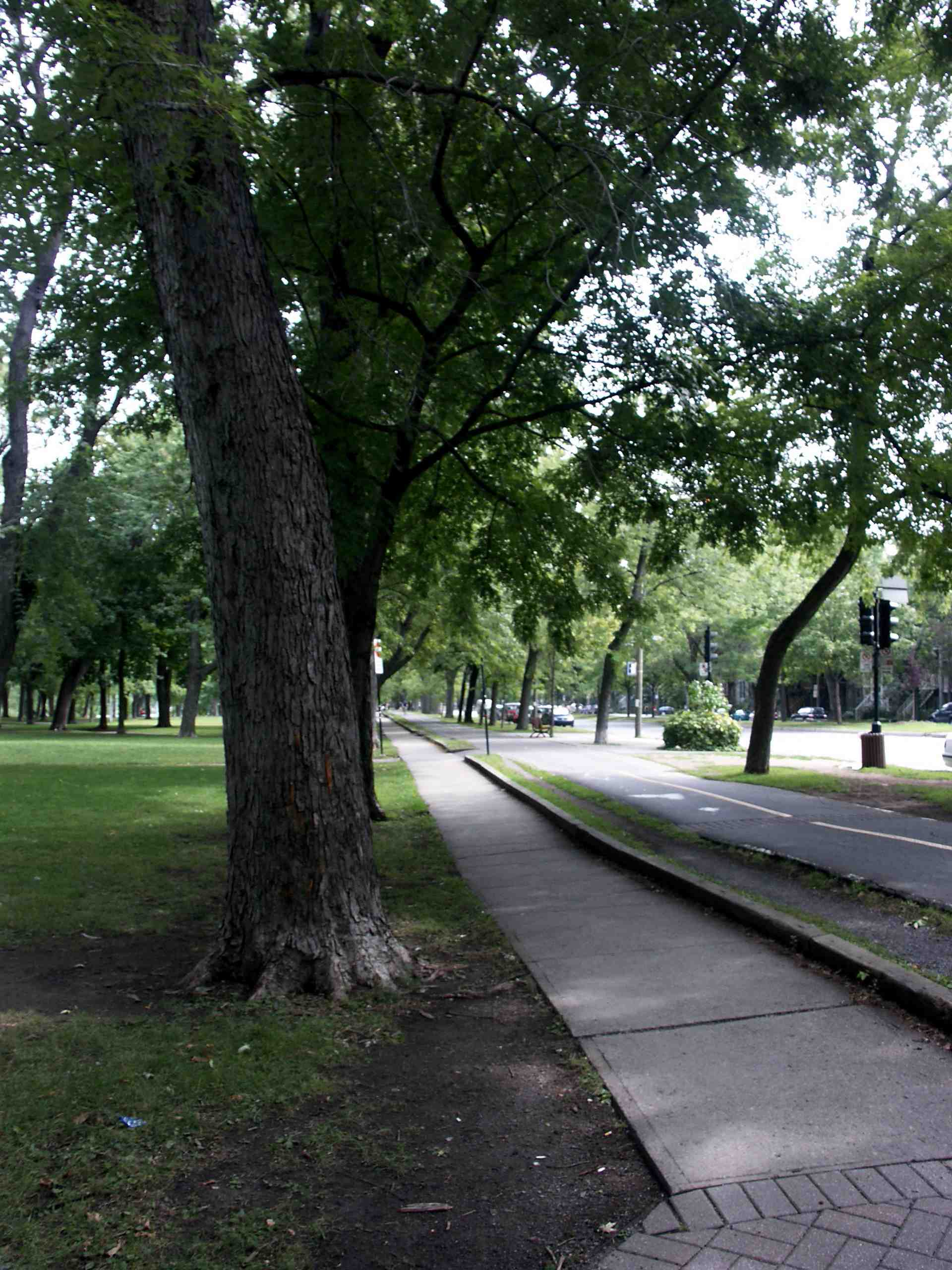 Piste cyclable au parc Lafontaine à Montréal, août 2005. Photo par User:Gene.arboit.